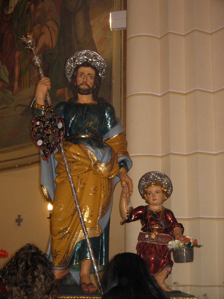 Pisano Etneo (CT) - Simulacro ligneo di S. Giuseppe - Chiesa "S. Giuseppe" - Foto D. Pennisi